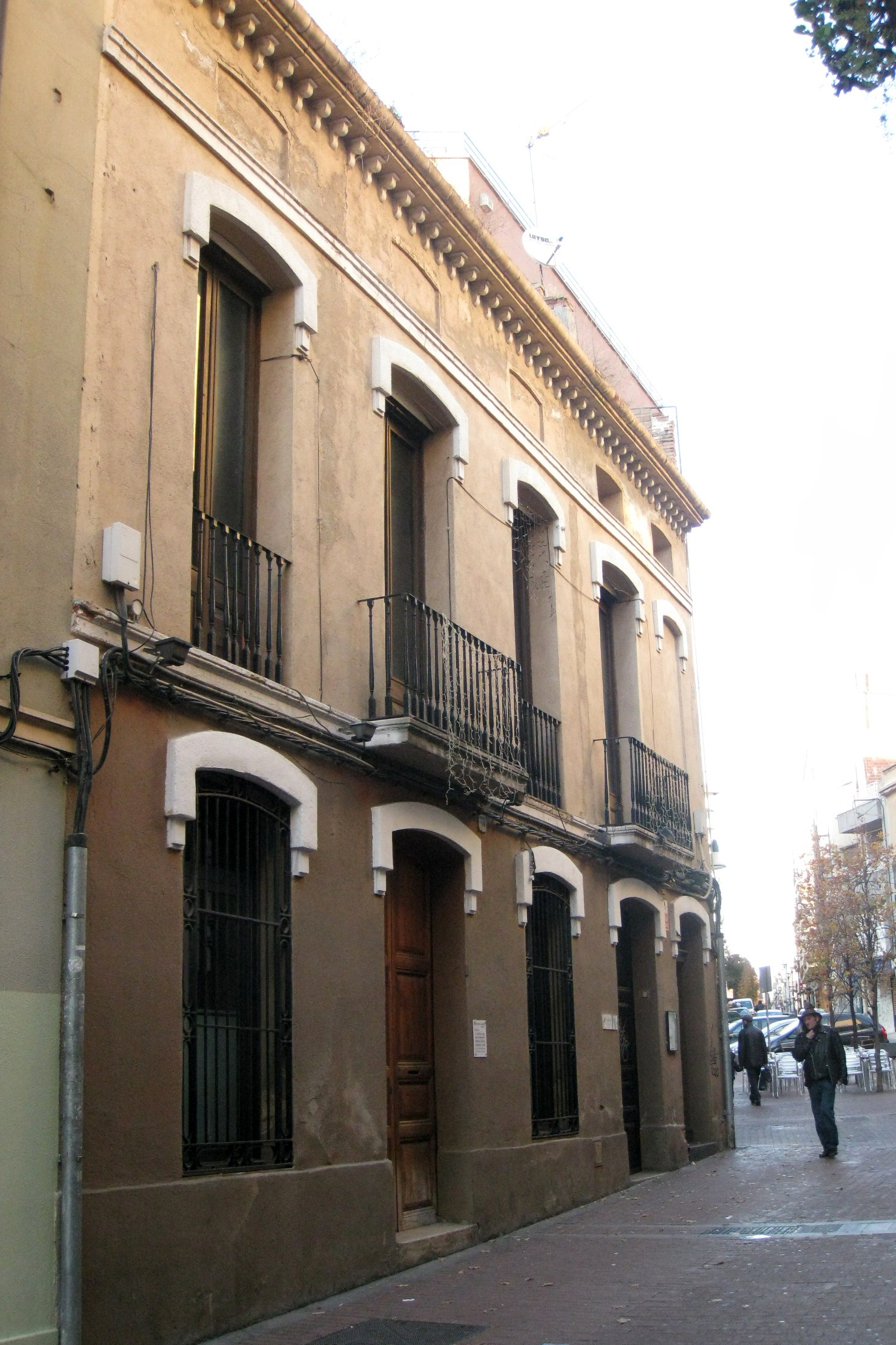 Cal Conco (Terrassa)